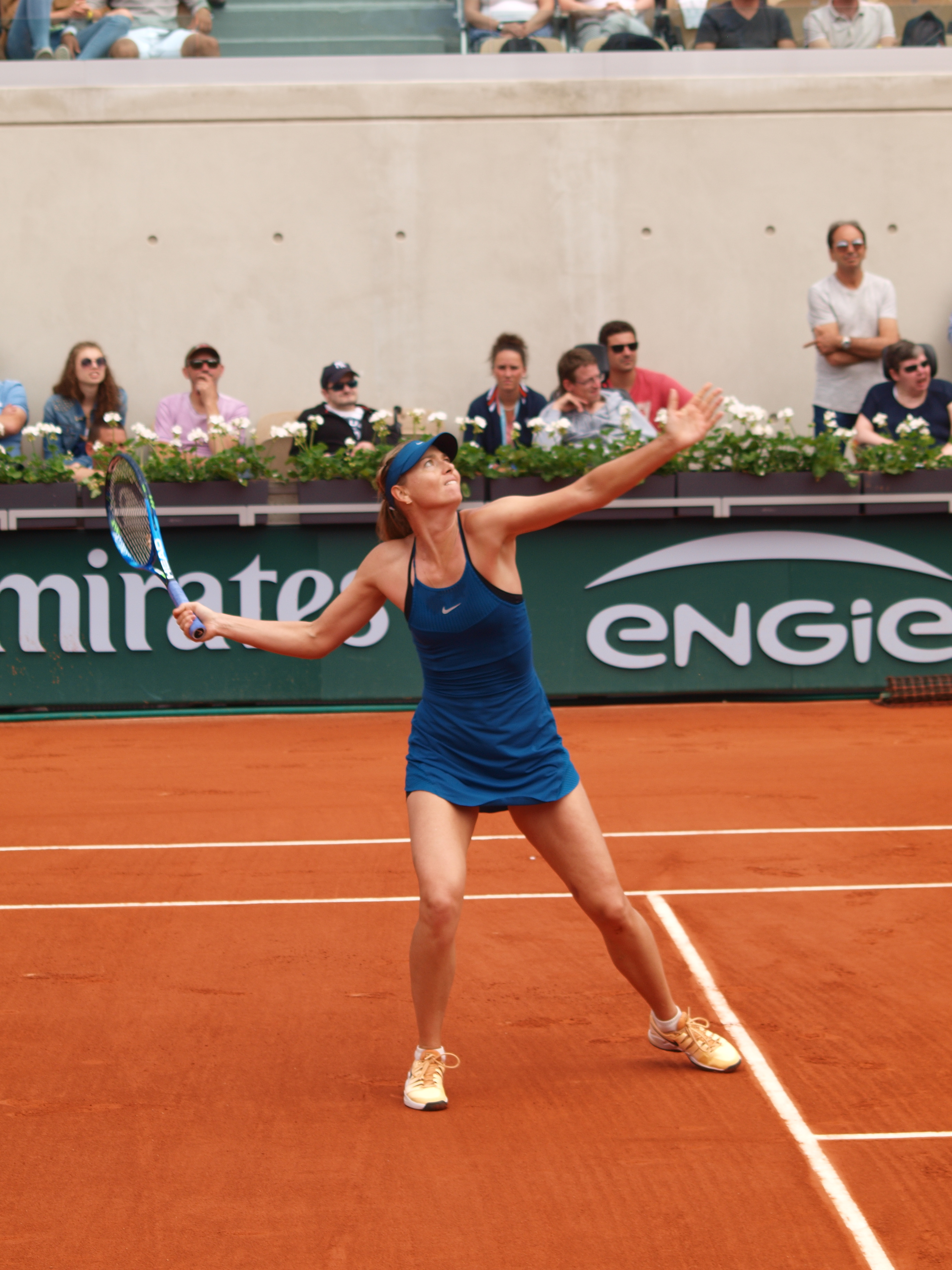 Maria Sharapova, durant le match du 29 mai 2018, sur le court Lenglen (stade Roland Garros) en compétition contre Richèl Hogenkamp.